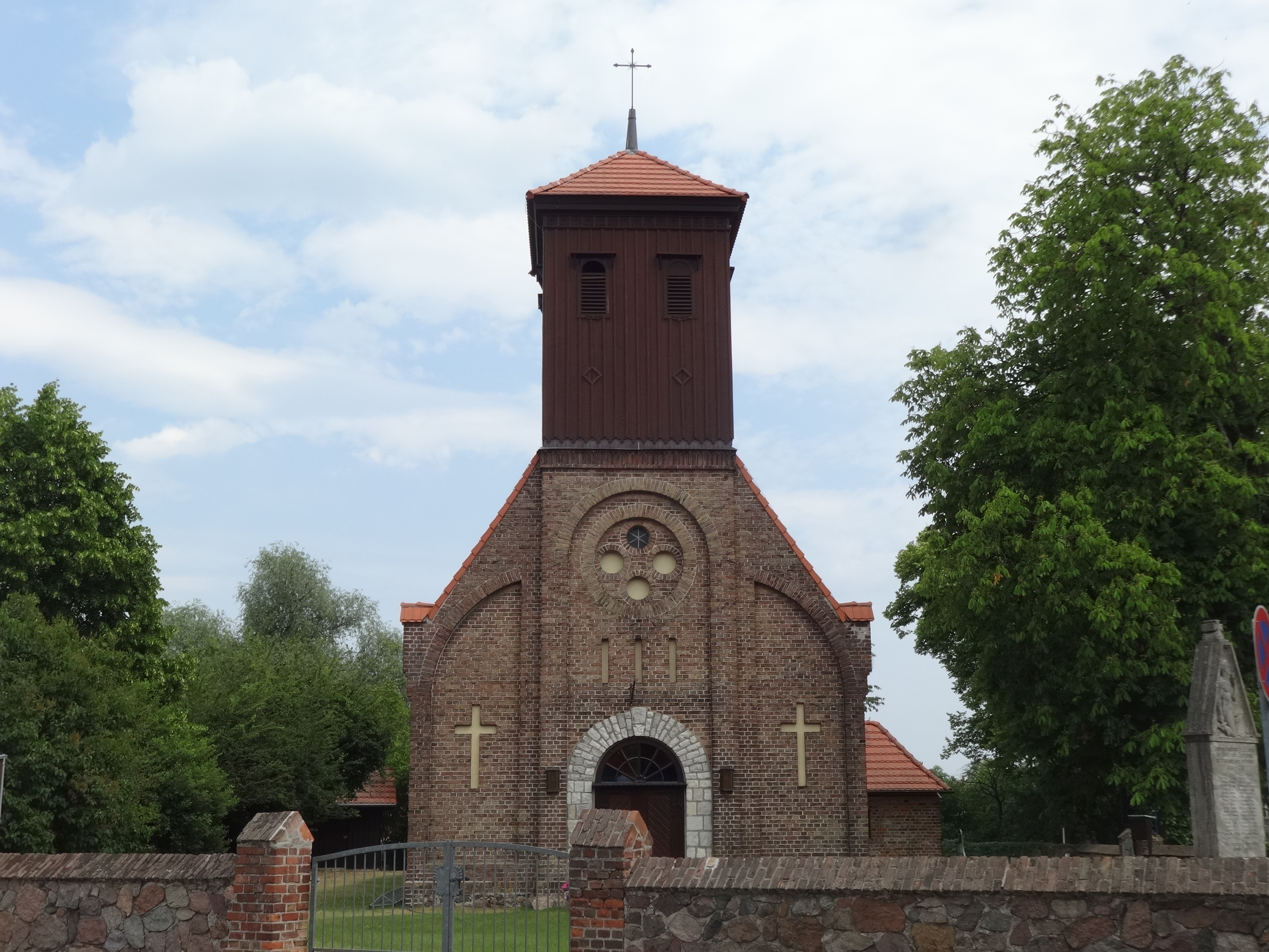 Die Dorfkirche im Ortsteil Groß Besten entstand vermutlich Ende des 14. Jahrhunderts. In den Jahren 1883 bis 1884 erweiterte die Kirchengemeinde das Bauwerk in Richtung Westen um den Turm sowie eine Vorhalle an der Südseite der Kirche. In den Jahren 1975 bis 1980 wurde sie umfangreich restauriert. Im Innern des flach gedeckten Bauwerks befinden sich ein schlichter Altaraufsatz sowie eine Fünte aus dem 17. oder 18. Jahrhundert.